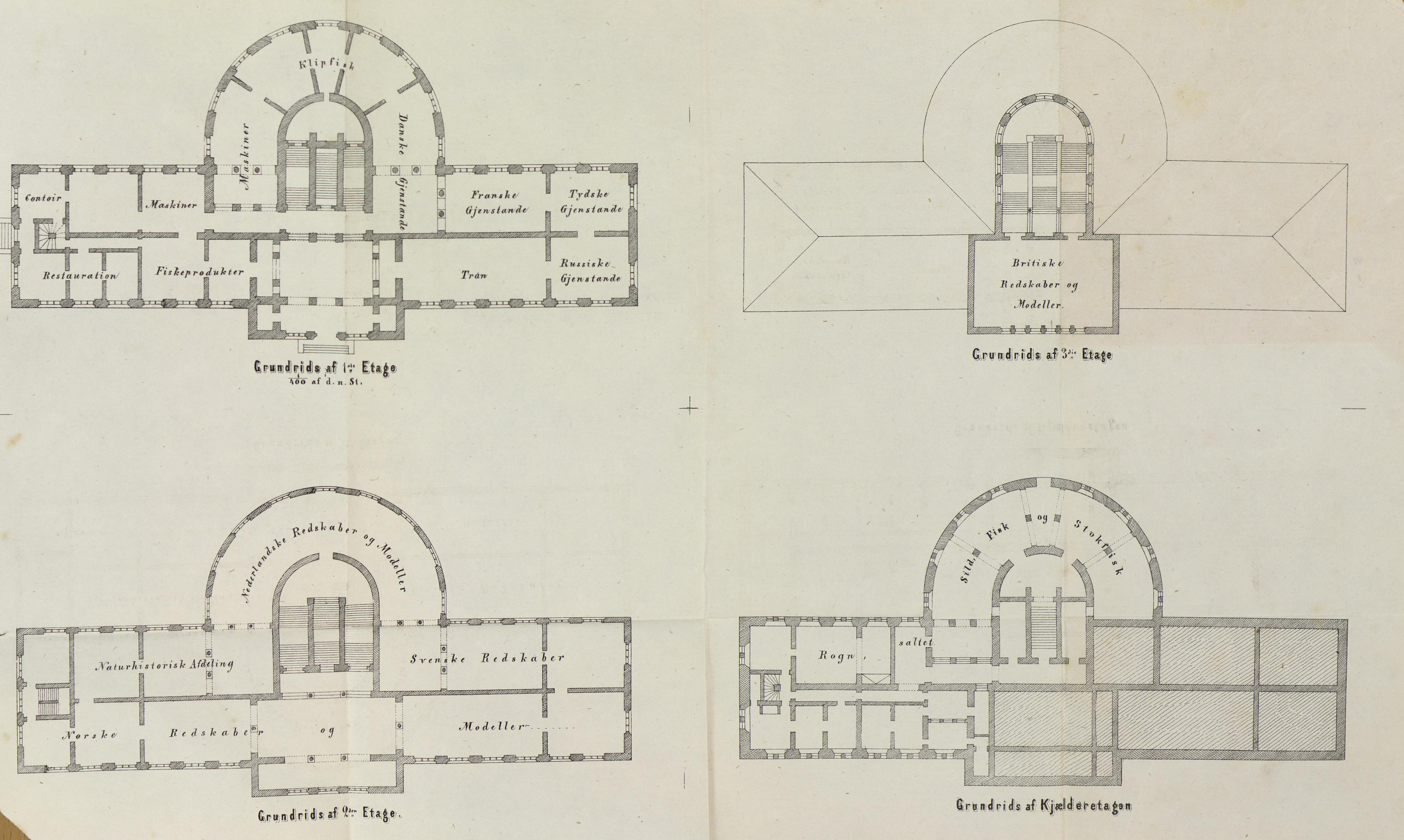 Illustrasjon hentet fra boken "Catalog over de til den internationale Fiskeriudstilling i Bergen 1865 indsendte Gjenstande" av og utgitt av (Bergen, [1865])